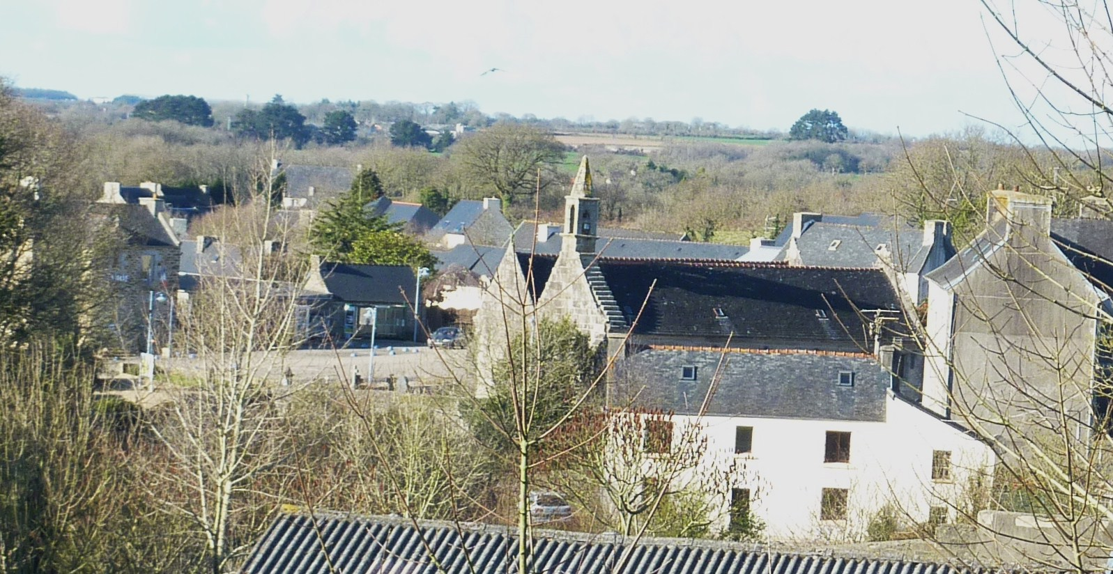 Loc-Eguiner-Saint-Thégonnec : le bourg